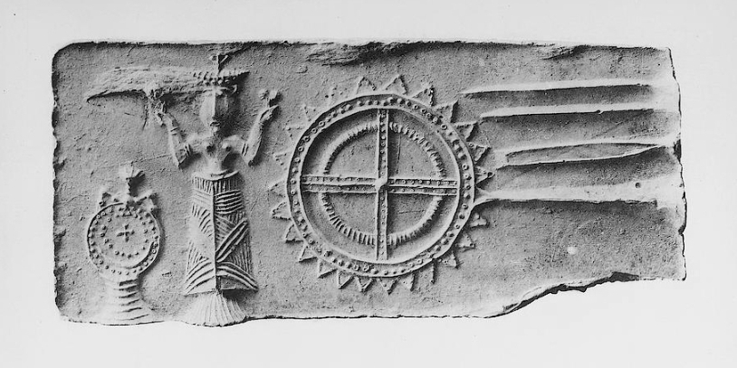 Fotografie des Abdruckes einer Gussform aus Schiefer. Gefunden im Oktober 1899 nordwestlich des Ortes Palekastro.